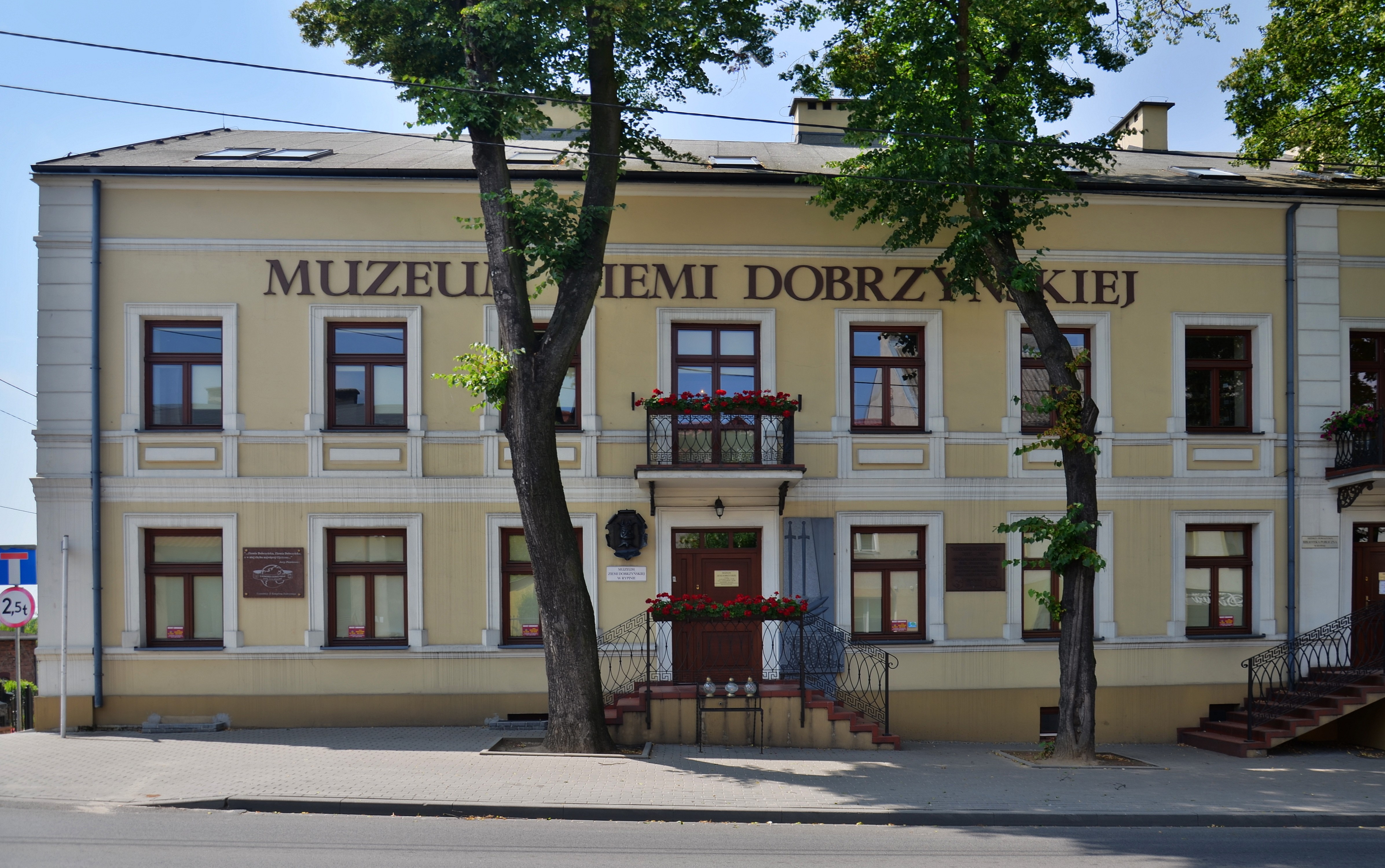 Muzeum Ziemi Dobrzyńskiej, fasada